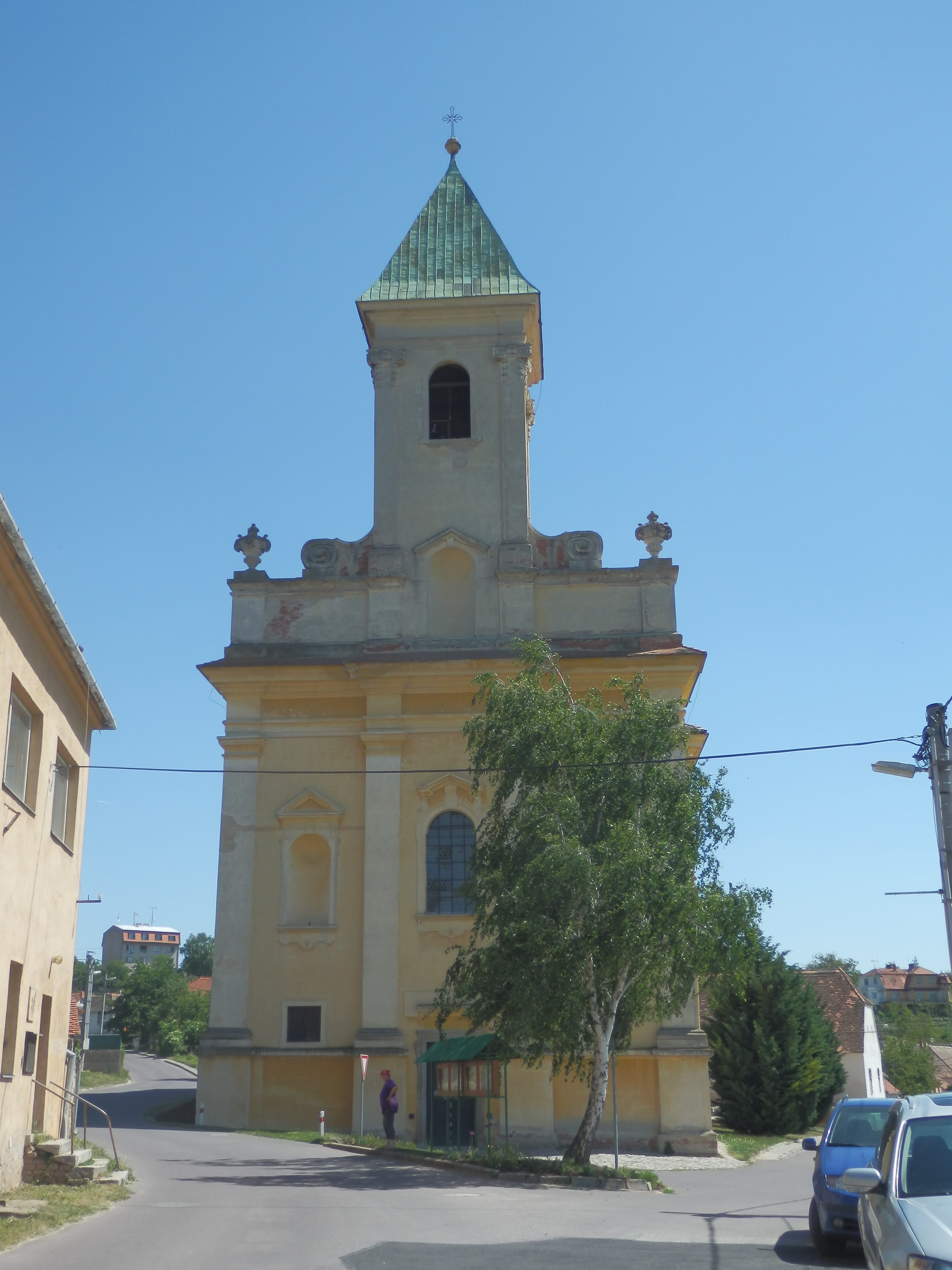 Kostel svatého Jana Nepomuckého, Dyje (okres Znojmo).